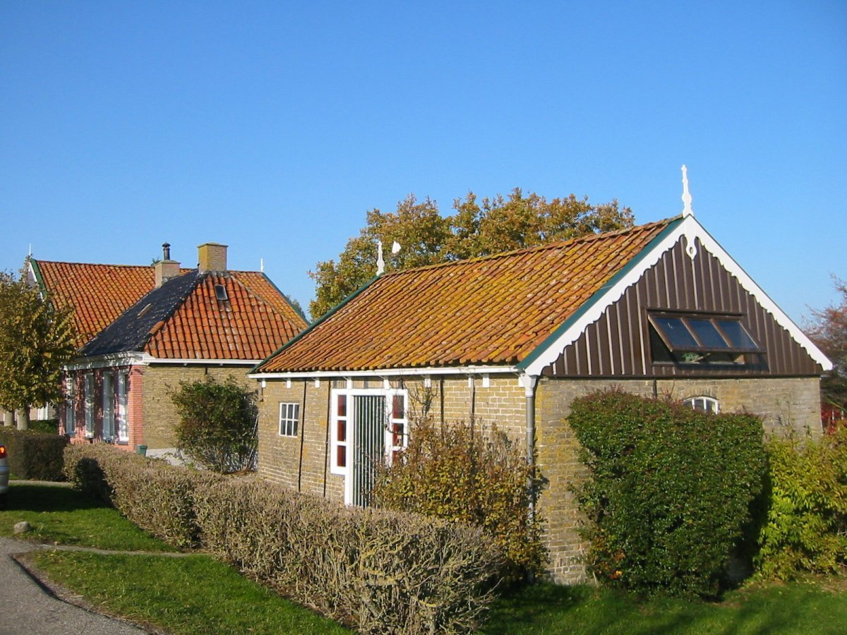 Tjasker It Heidenskip/ Ten-Bruggencatenummer: 03728: Woningen bij paaltjasker (opmerking: Foto gemaakt in het kader van het project Actualisering Monumentenregister (AMR).)